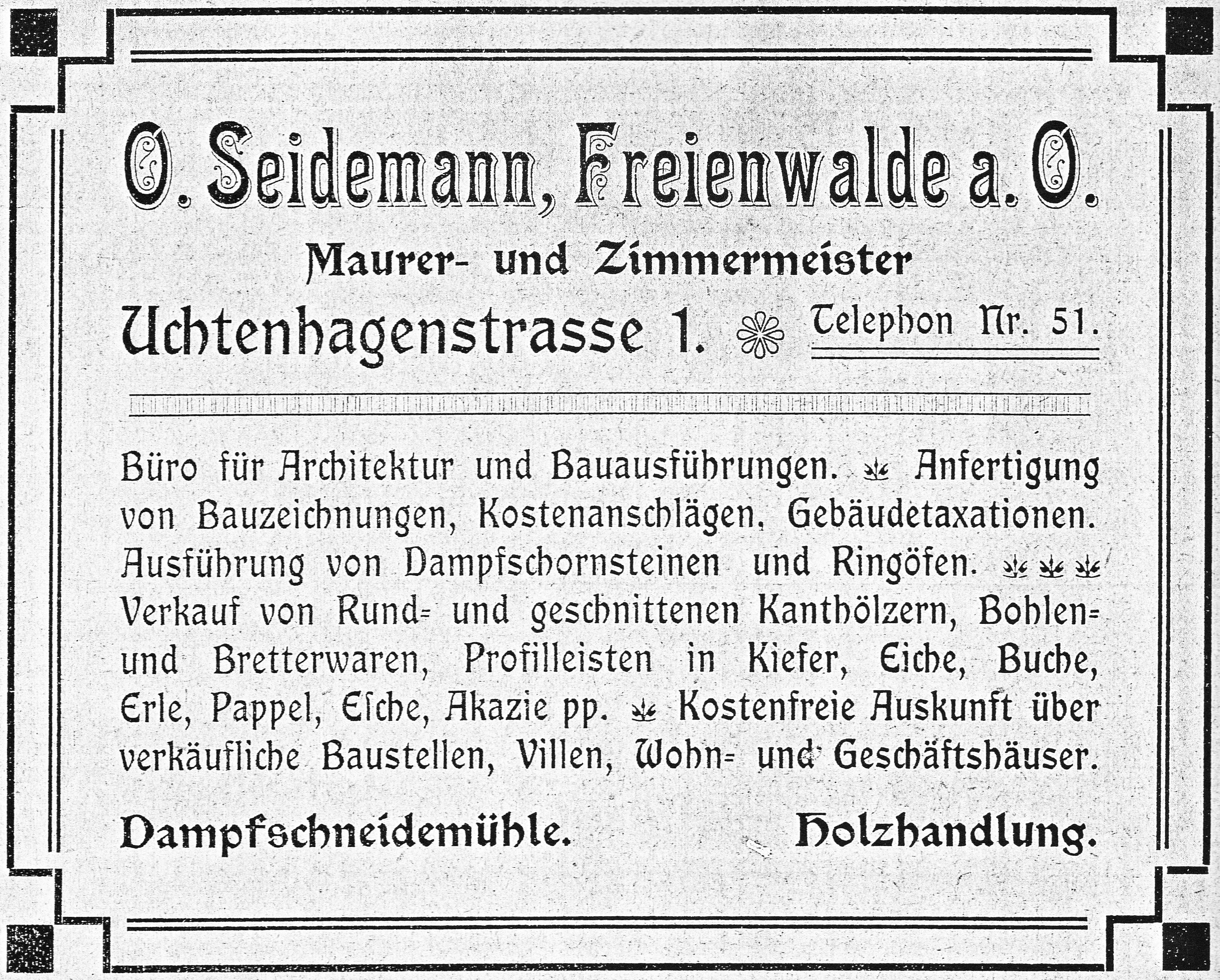 Zeitungsanzeige des Freienwalder Bauunternehmer, Maurer- und Zimmermeister Otto Seidemann, In: Adressbuch für Bad Freienwalde a. Oder, 1909/10, E. Battré, Buchdruckerei und Buchbinderei, Uchtenhagenstraße 1, Bad Freienwalde